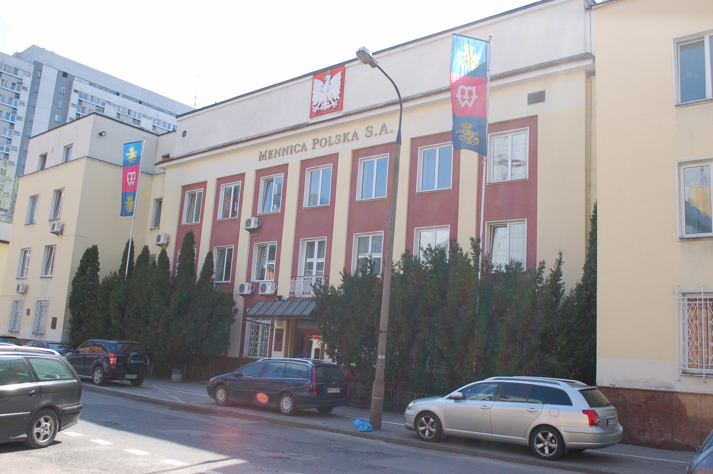 Mennica Polska